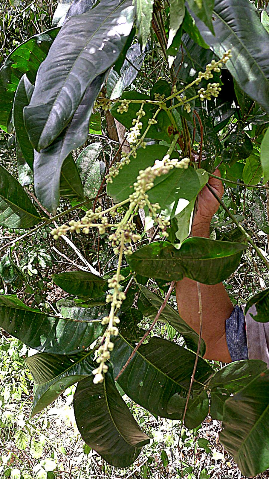 Talisia esculenta (A. St.-Hil.) Radlk.